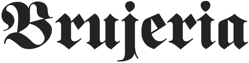 Logo de la banda mexico-estadounidense; Brujería (grindcore)